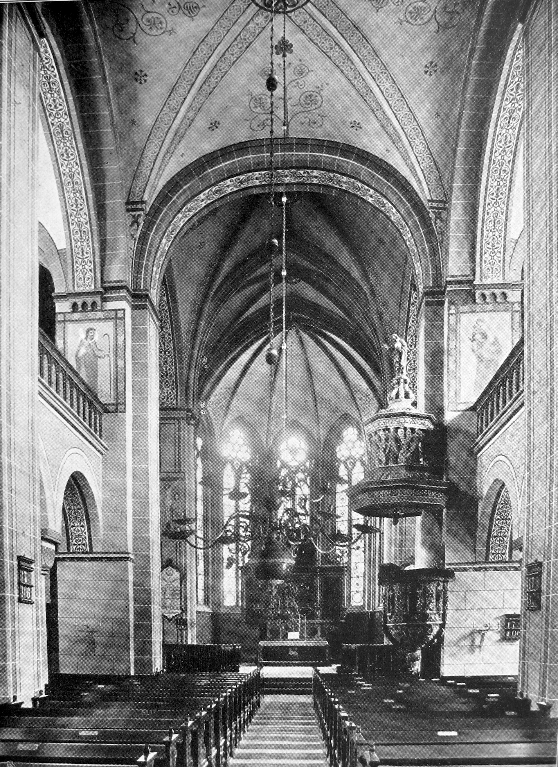 Soest, Petrikirche, Innenansicht nach Osten, Ludorff 1905